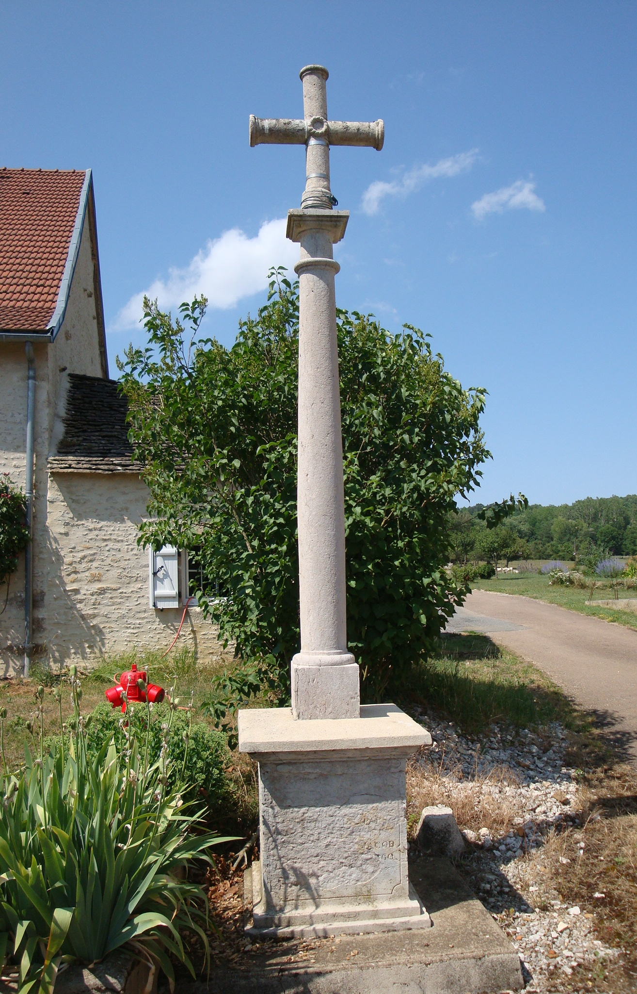 Croix "Jacob" de Verseilles-le-Bas